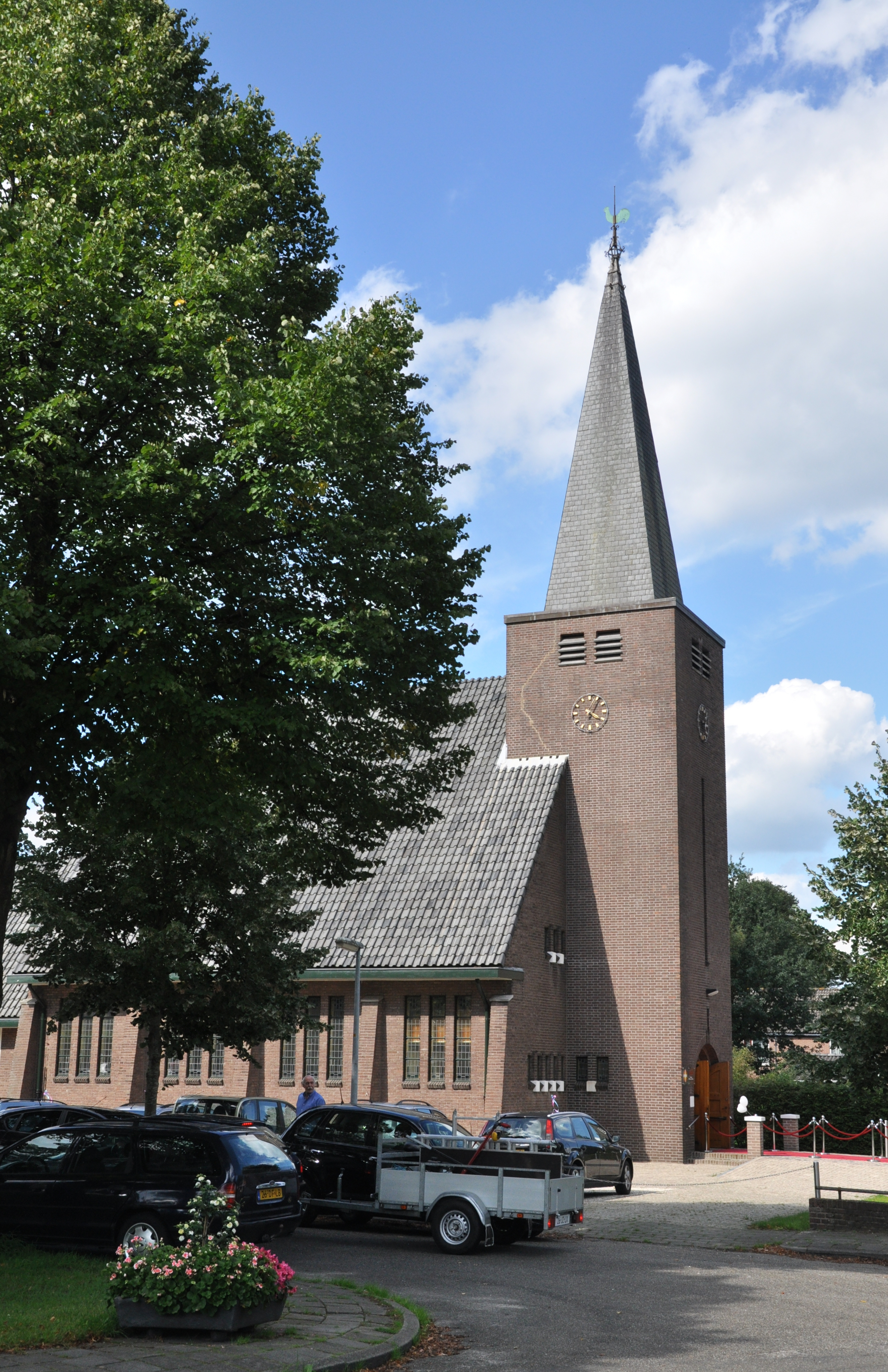 protestantse kerk Lieren Unknown